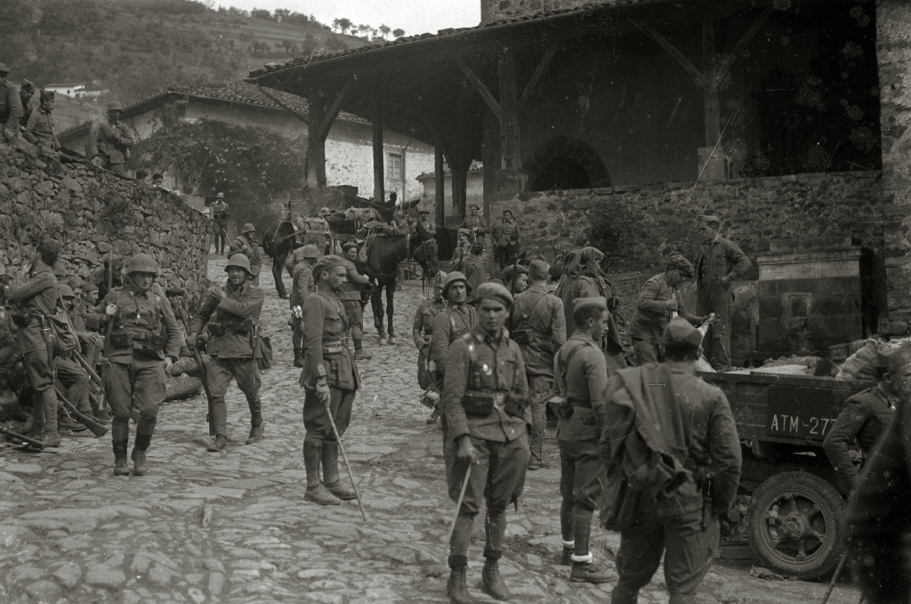 Título original: Grupos de milicianos con sus armas en la localidad de Alegia (9/10) Localización: Alegría de Oria (Guipúzcoa)